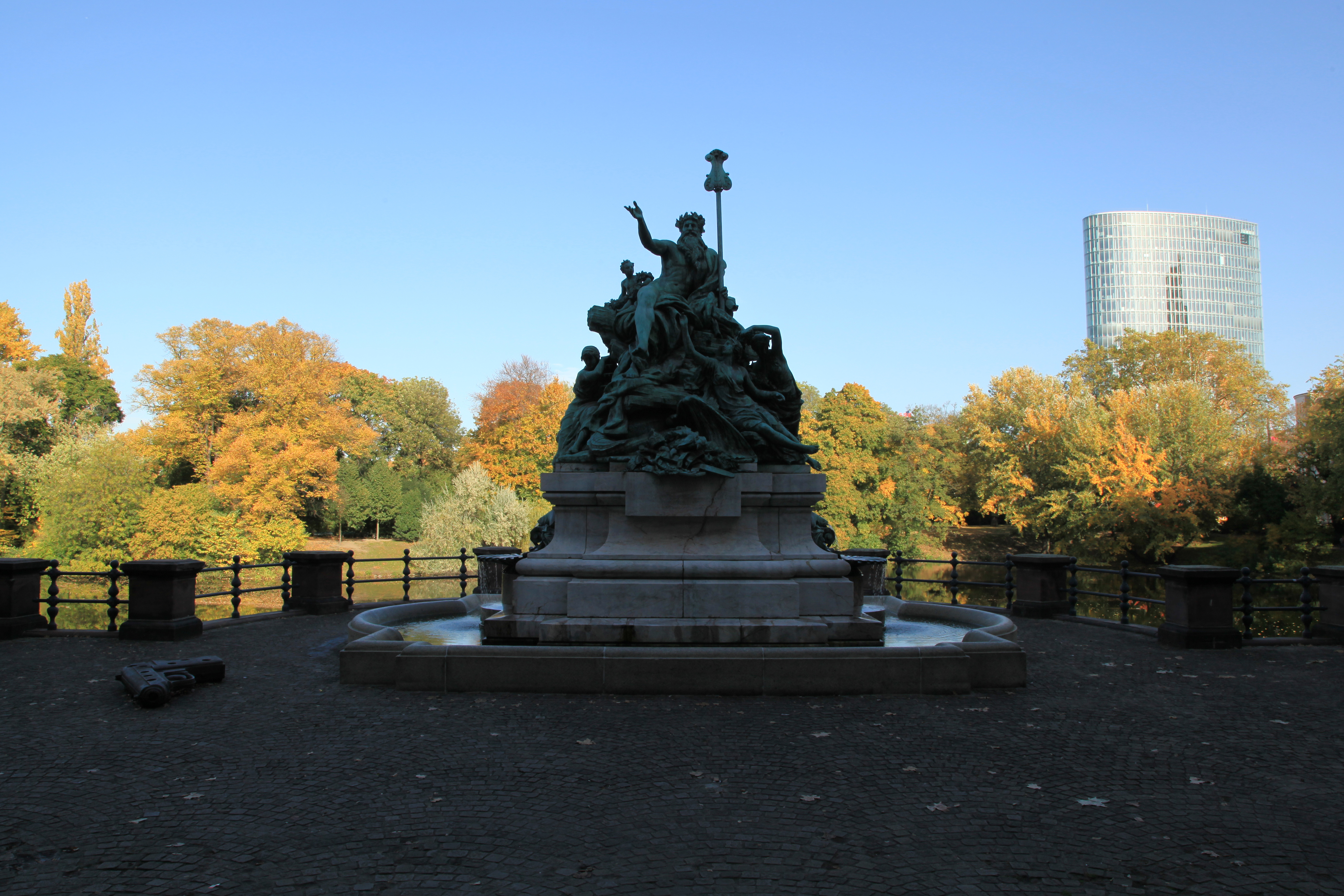 Vater Rhein und seine Töchter an der Ständehausstraße in Düsseldorf